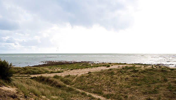 Pointe de Grignon - Ars en Ré - îZle de Ré - Charente-Maritime Photo issue de ma banque d'images : Pep.per 3 octobre 2006 Ã 22:31 (CEST)